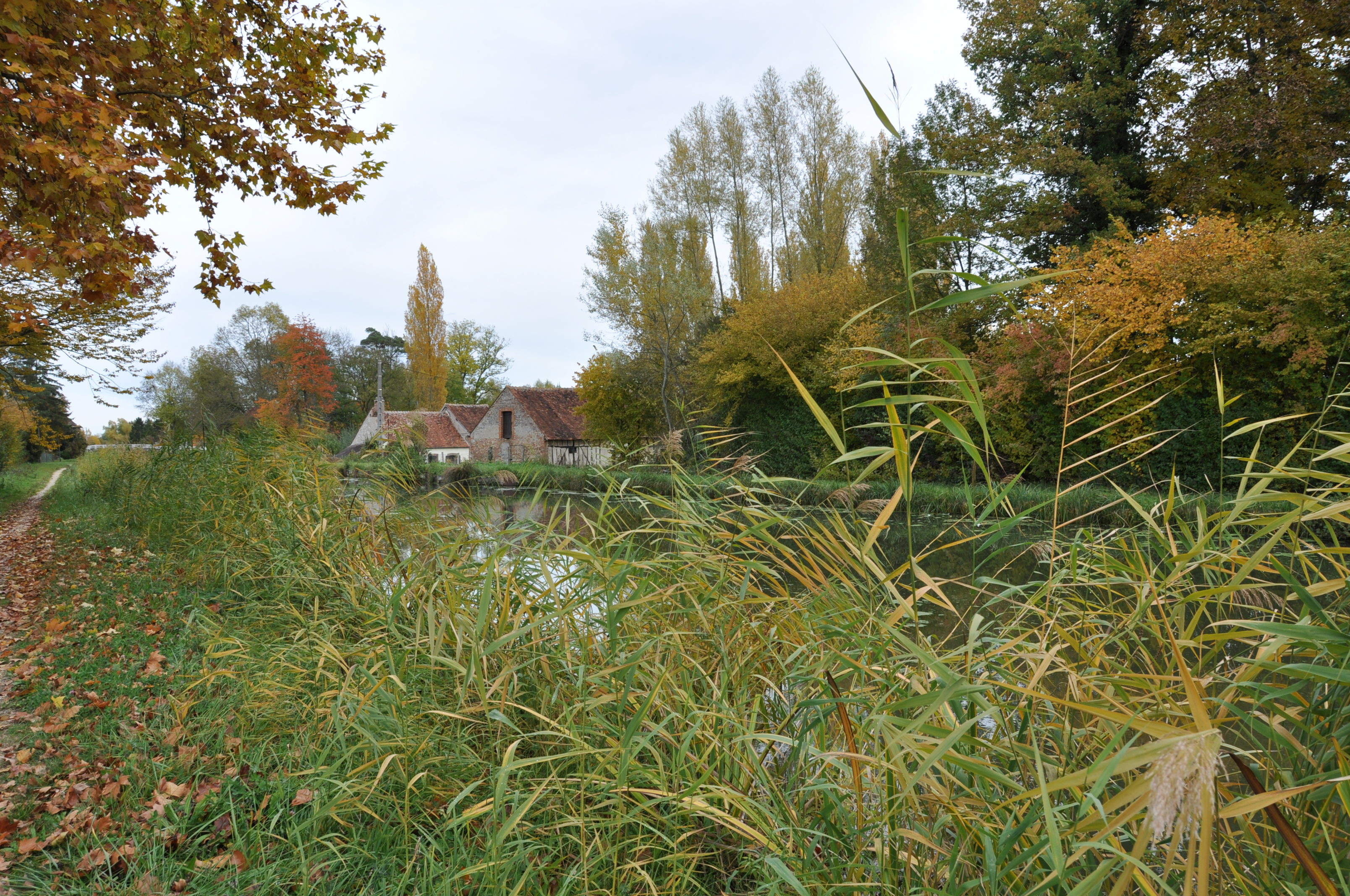 Le canal d'Orleans à Chailly-en-Gâtinais, Loiret, Centre, France